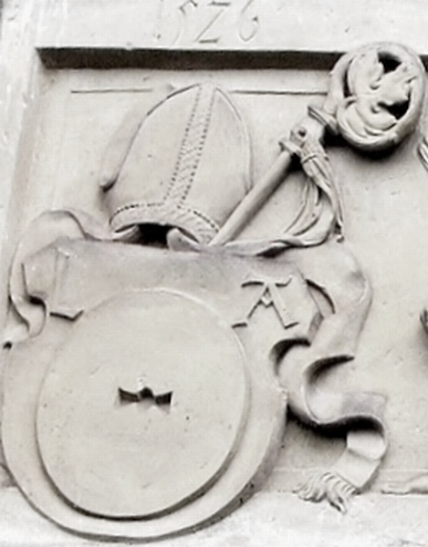 Wappen des Laurentinus Autenrieth im Kloster Lorch